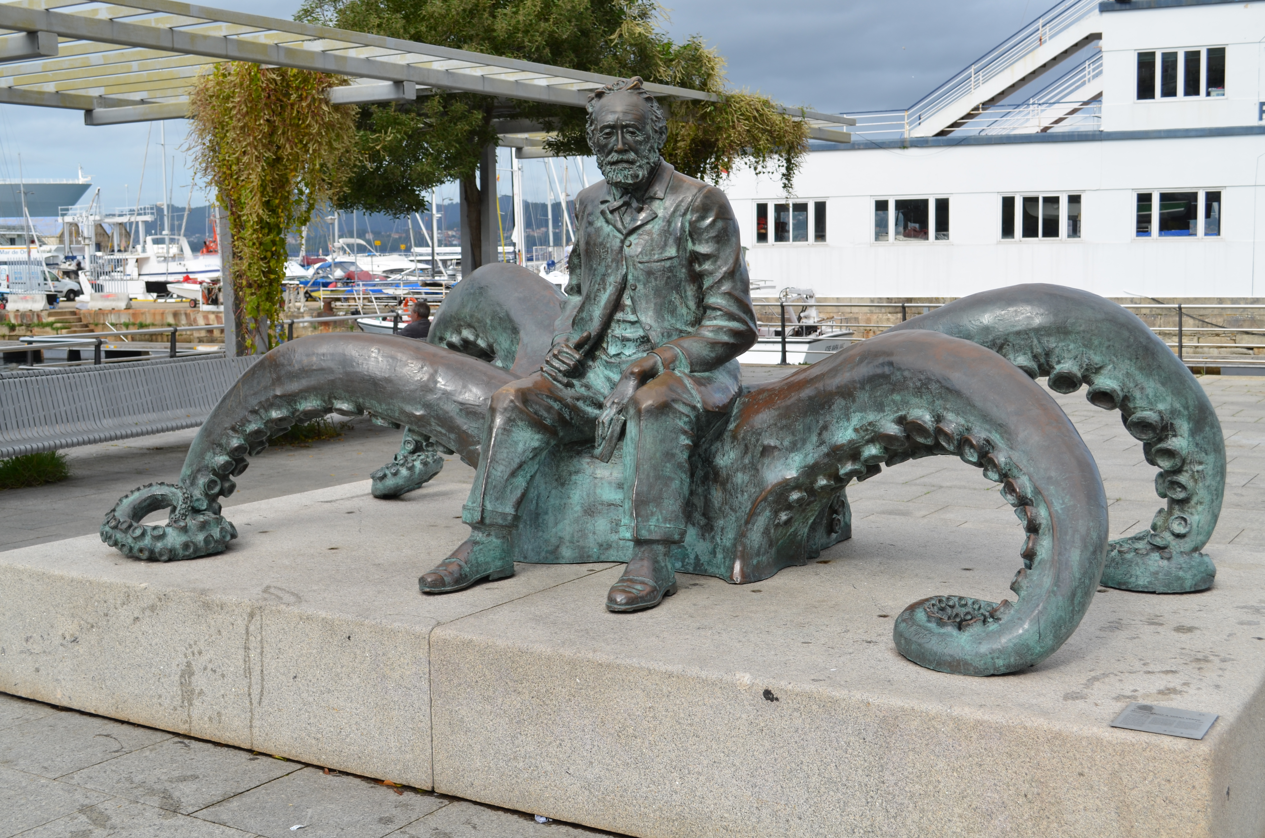 Monumento_a_Jules_Verne_-_Jose_Moreno_2005_-_Vigo_-_Spain